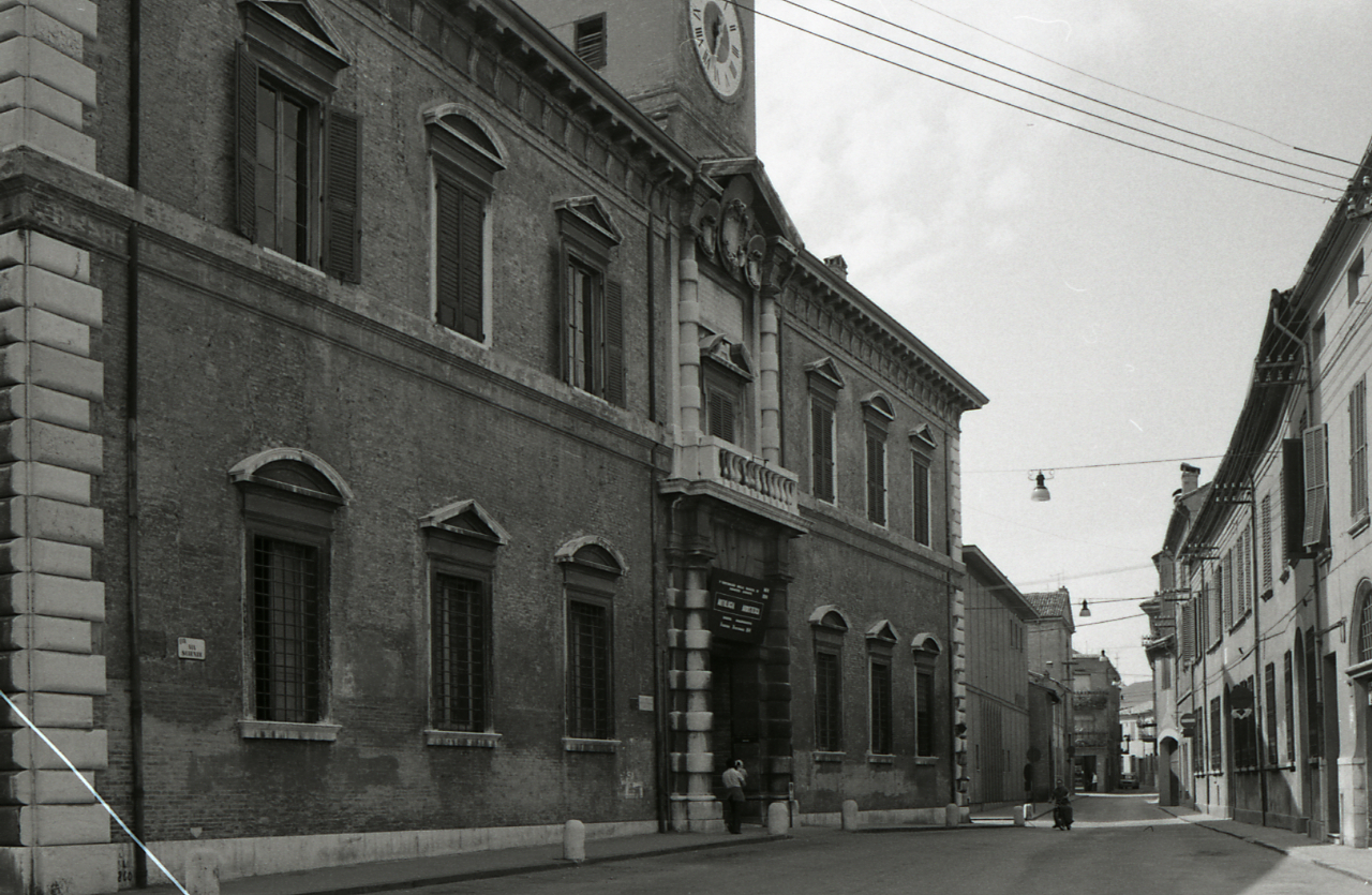 Ferrara. Centro storico: vedute urbane; palazzi ed edifici religiosi non identificati; Palazzo Paradiso: facciata e particolari portale Servizio fotografico : Ferrara, 1974 / Paolo Monti. - Strisce: 6, Fotogrammi complessivi: 36 : Negativo b/n, gelatina bromuro d'argento/ pellicola ; 35 mm. - ((Sul portanegativi: N[I]K[MA]T FP4. - (2):. - 2A-14A; 16A-19A? = Palazzo Paradiso: facciata e particolari portale;. - 20A-24A = edificio religiosio non identificato;. - 25A-37A = vedute urbane; palazzi. - Occasione: Documentazione del centro storico. - , presso Archivio Paolo Monti. - Fonte: Fattura di Paolo Monti: IV. Commesse/ Fattura n. 18/ Riprese fotografiche del centro storico (Mostra Vitalità del centro storico) (1974/10/16), presso Archivio Paolo Monti. - Fonte: Agenda di Paolo Monti: Leica 1501-3000 Controllo numerazione (1950-1978)